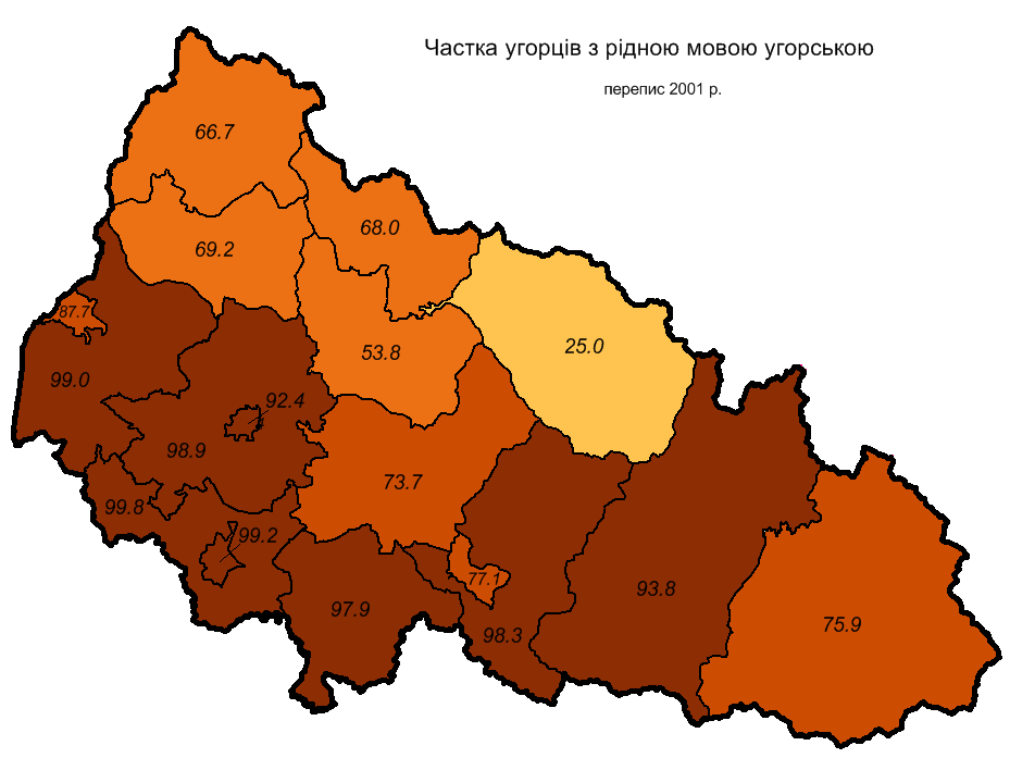 Частка угорців Закарпатської області що назвали рідною мовою угорську під час перепису 2001 року / Percentage of hungarians with hungarian as native language in Zakarpatska oblast (Transcarpathia) 2001 census